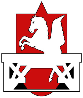 352. Infanteriedivision Logo